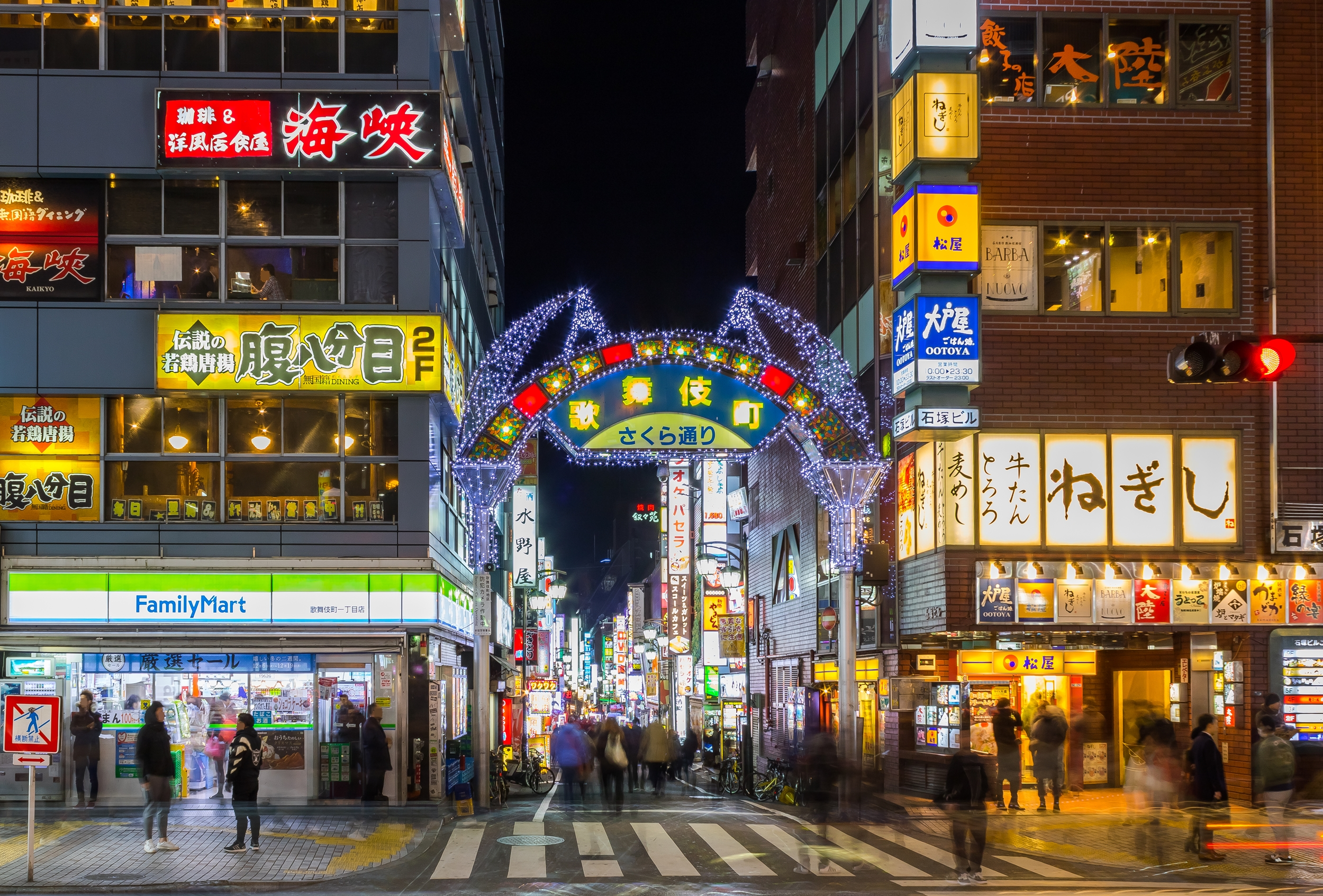 歌舞伎町さくら通り。